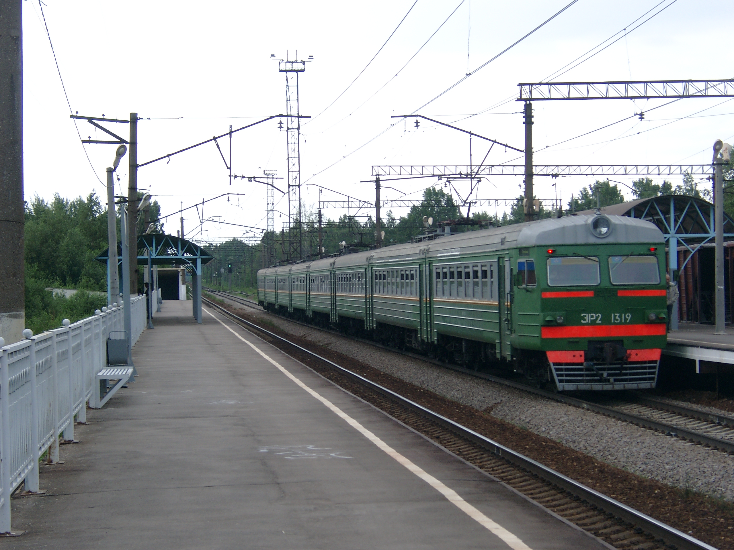 Станция Капитолово. Электропоезд на Сосново у платформы.